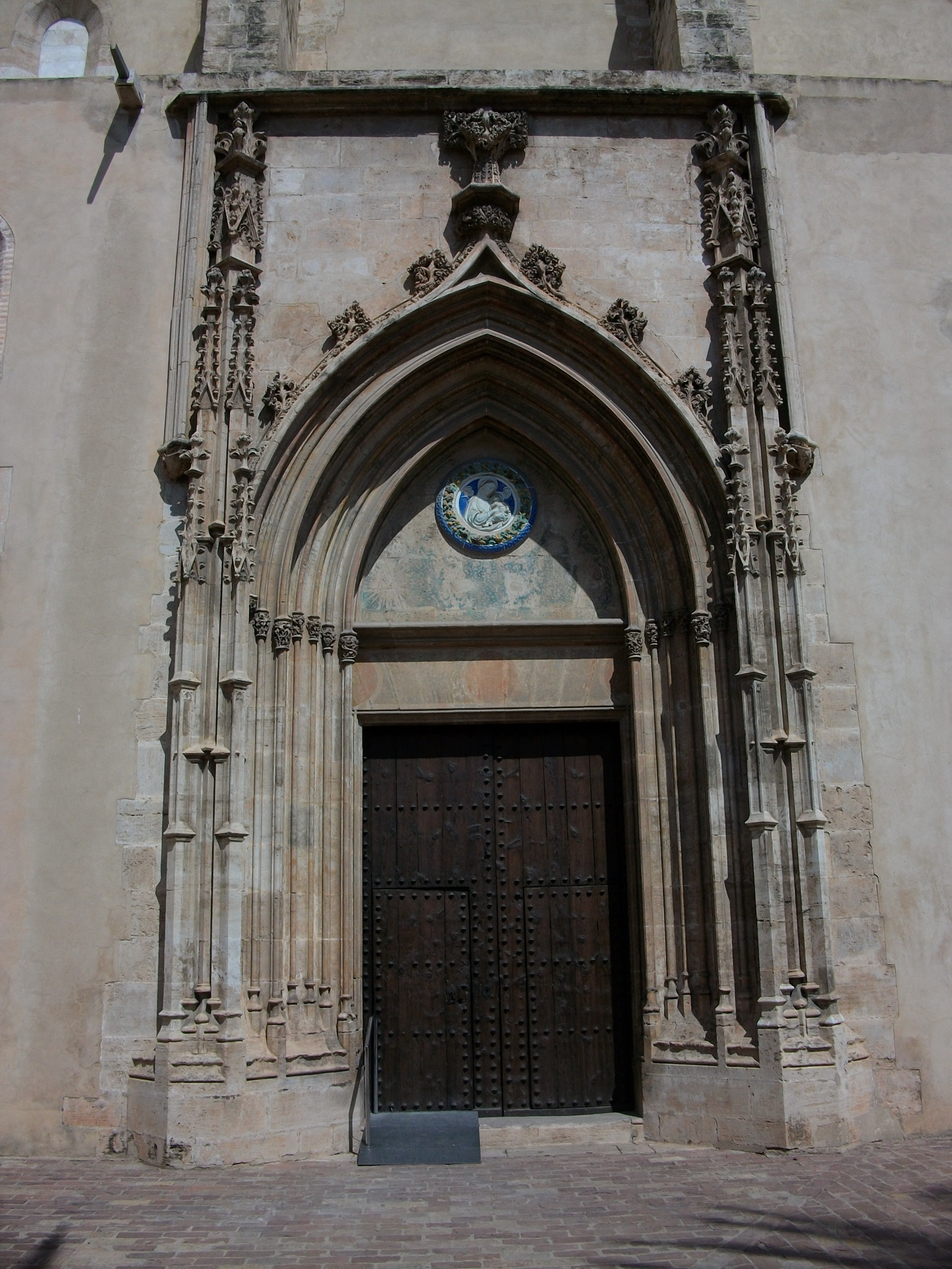 Portada gòtica flamígera de l'església del Monestir de la Trinitat de València.